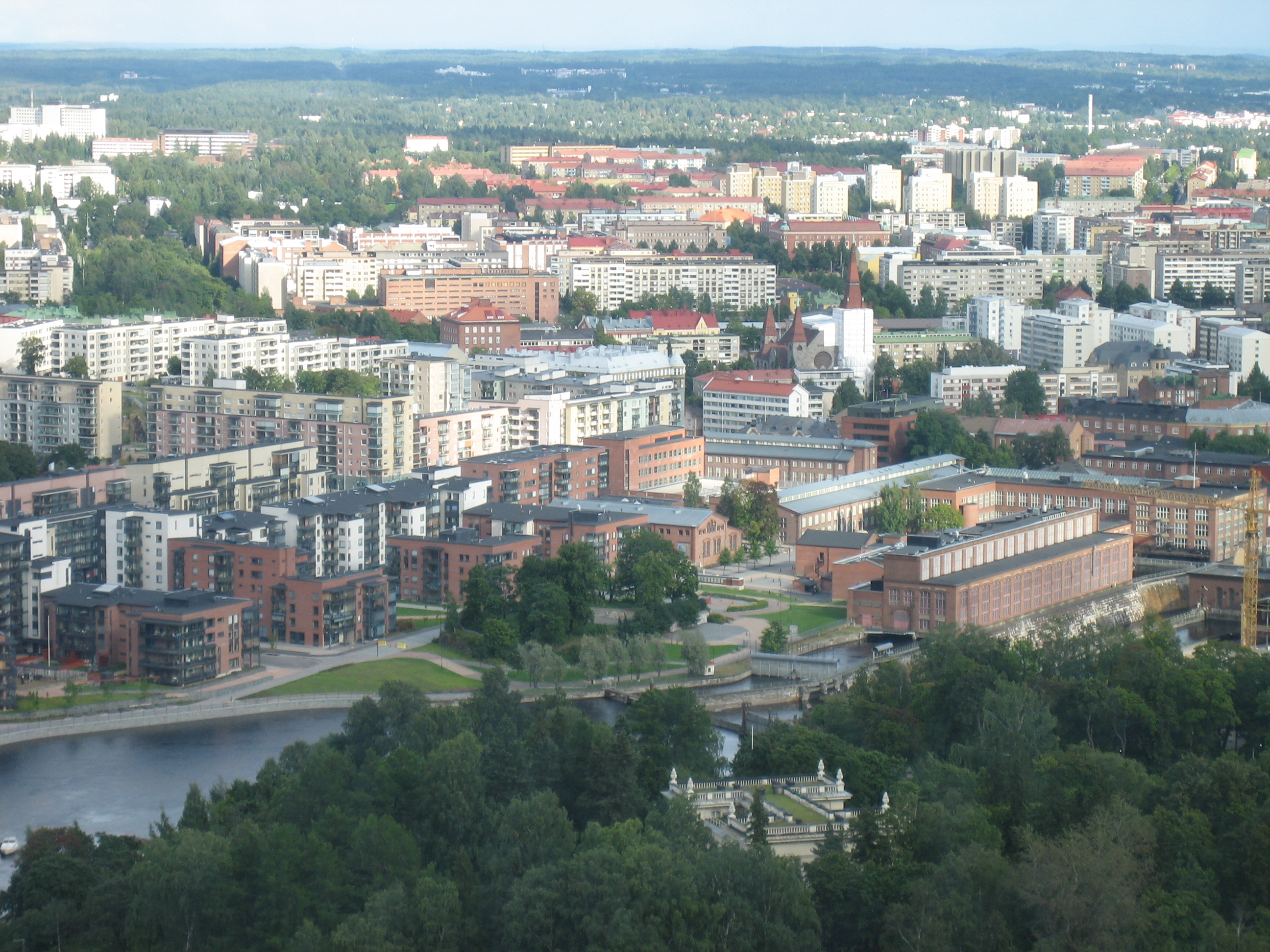 Näsinneulasta itse kuvattu näkymä Tampereen Koskenniskaan ja Tampellan alueelle.